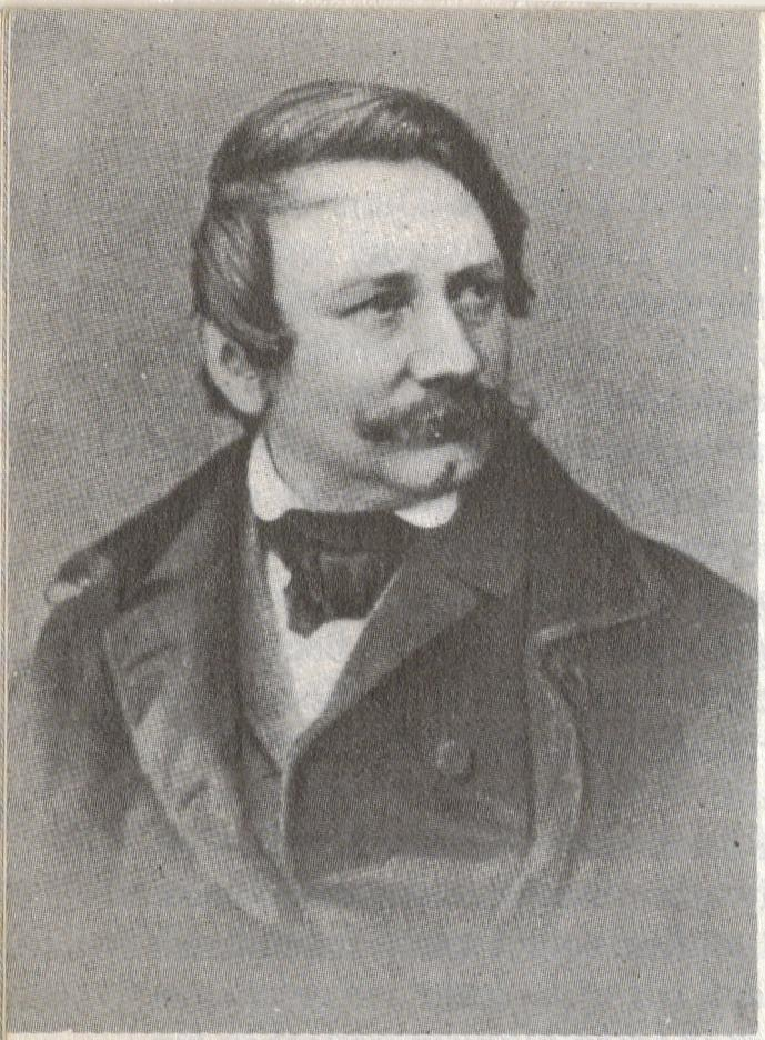 The painter Christian Ernst Bernhard Morgenstern (1805-1867), Christian Morgensterns grandfather